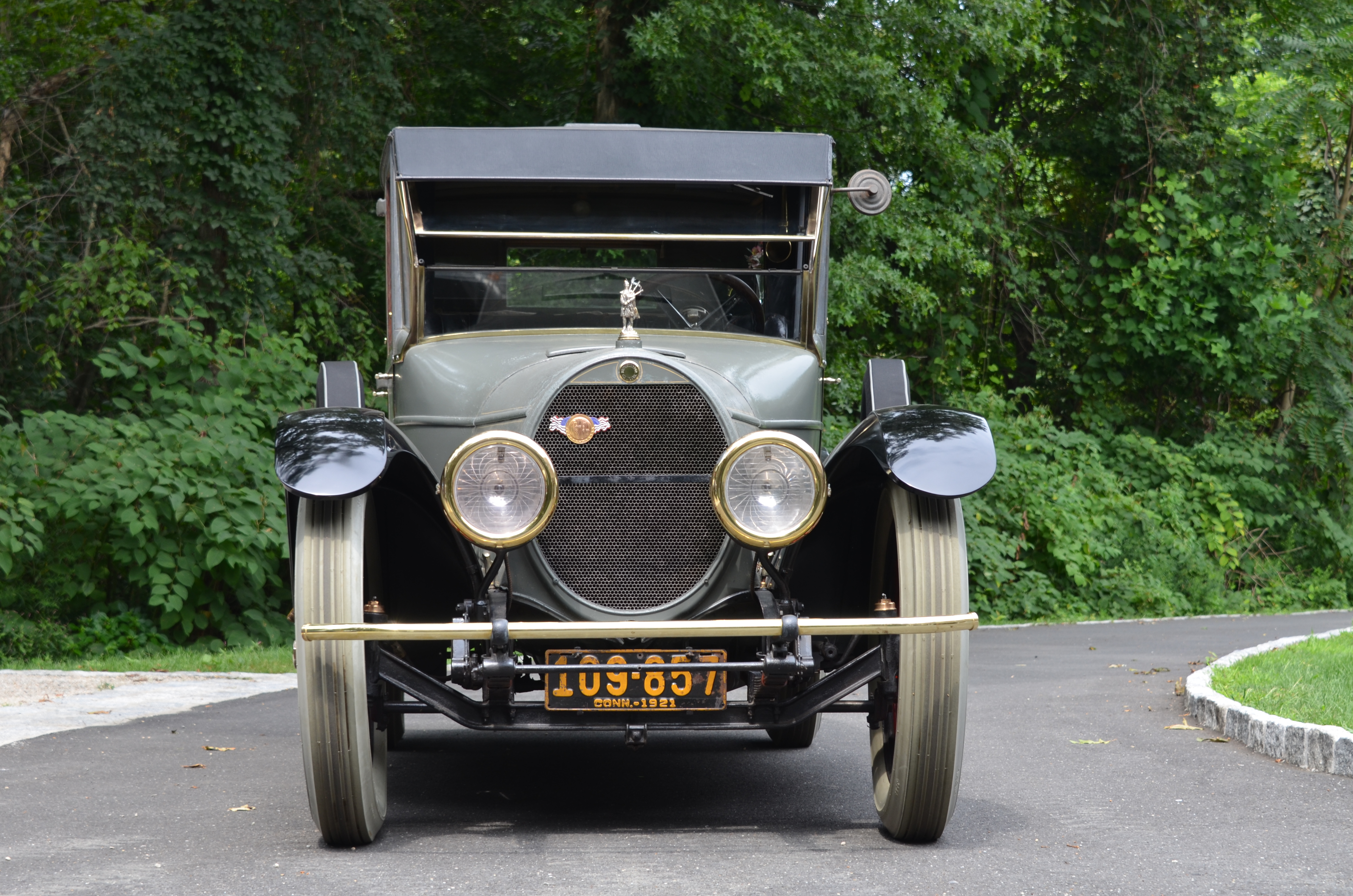 1921 Brewster